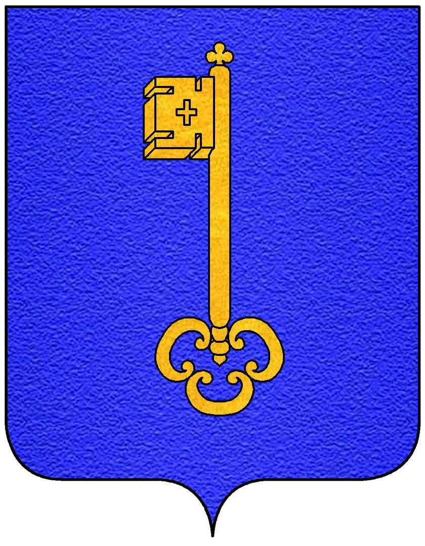 Stemma della famiglia Riccardi